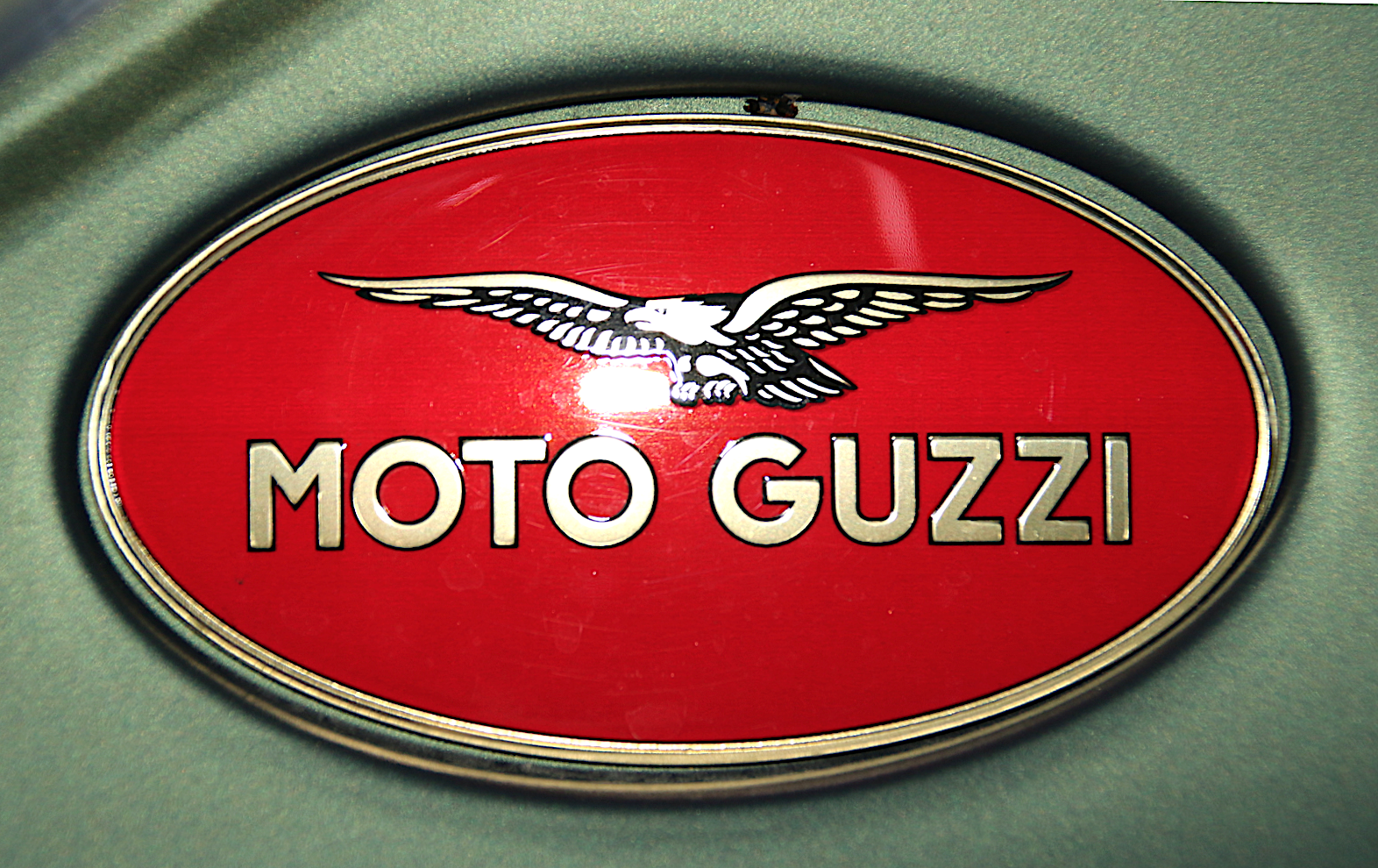 Moto Guzzi Symbol